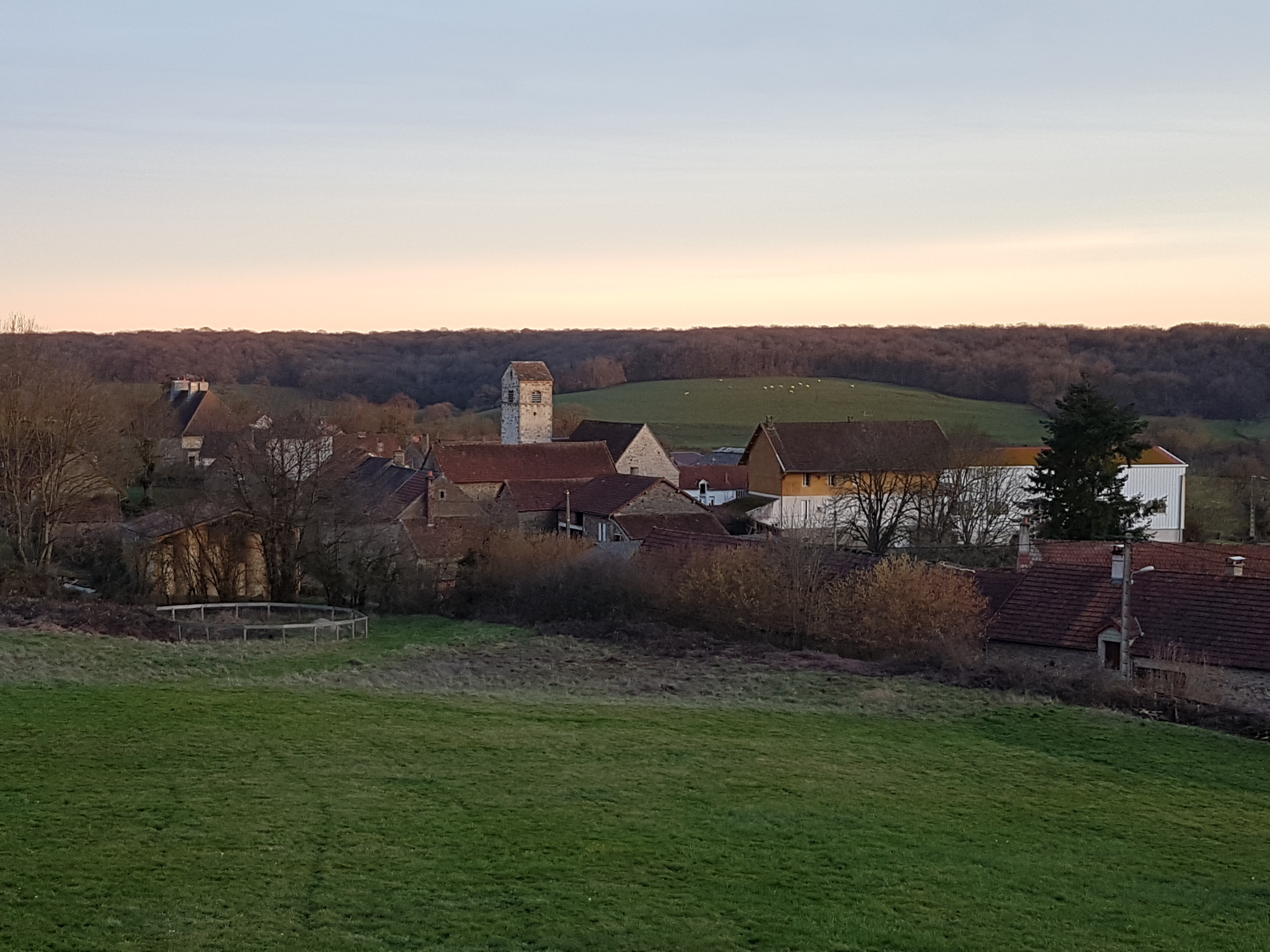 Vue du bourg de Collonge-la-Madeleine depuis le nord-ouest, un soir de février 2020. Au centre, le clocher de l'église Saint-Barthélémy.